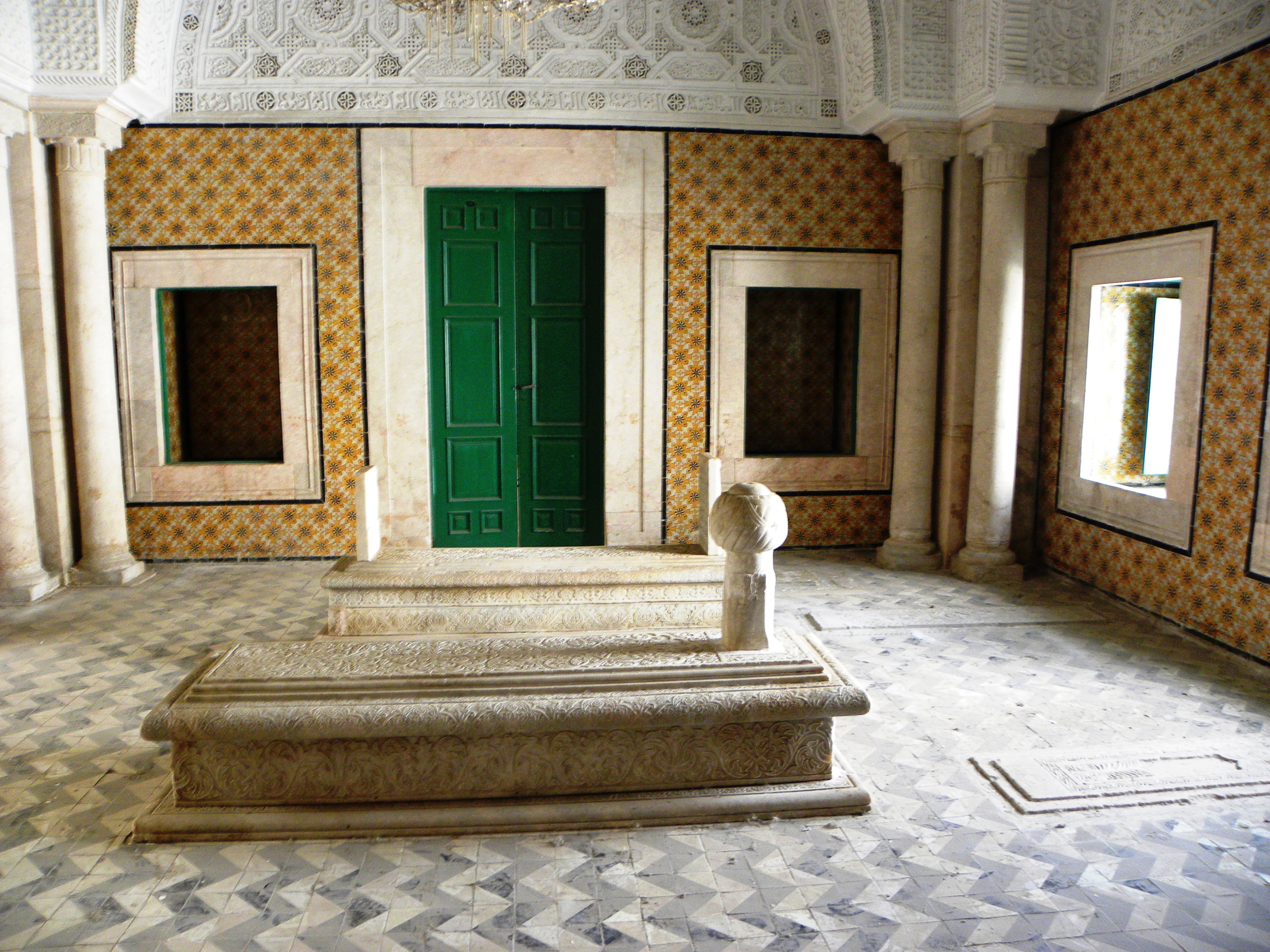 Il s'agit de l'intérieur de la Torba (Mausolée) de Ahmed Khodja Dey. A côté de lui sont inhumés : sa femme Turkia Bent el Hadj Mohamed Arnaout et leurs enfants